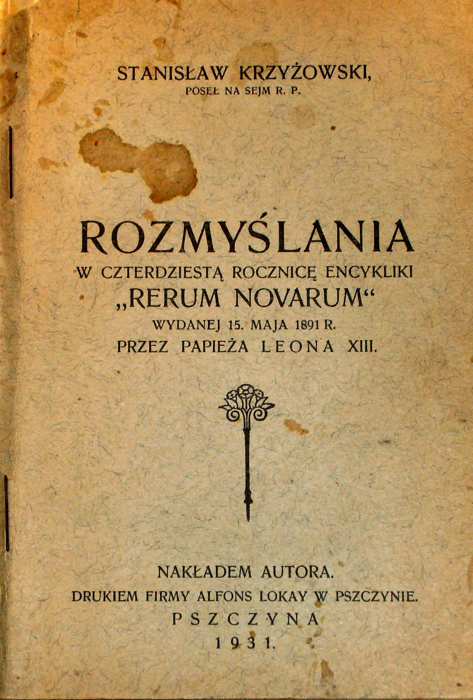 Stanisław Krzyżowski, Rozmyślania w czterdziestą rocznicę encykliki „Rerum novarum”, wydanej 15 maja 1891 r. przez papieża Leona XIII, Pszczyna 1931